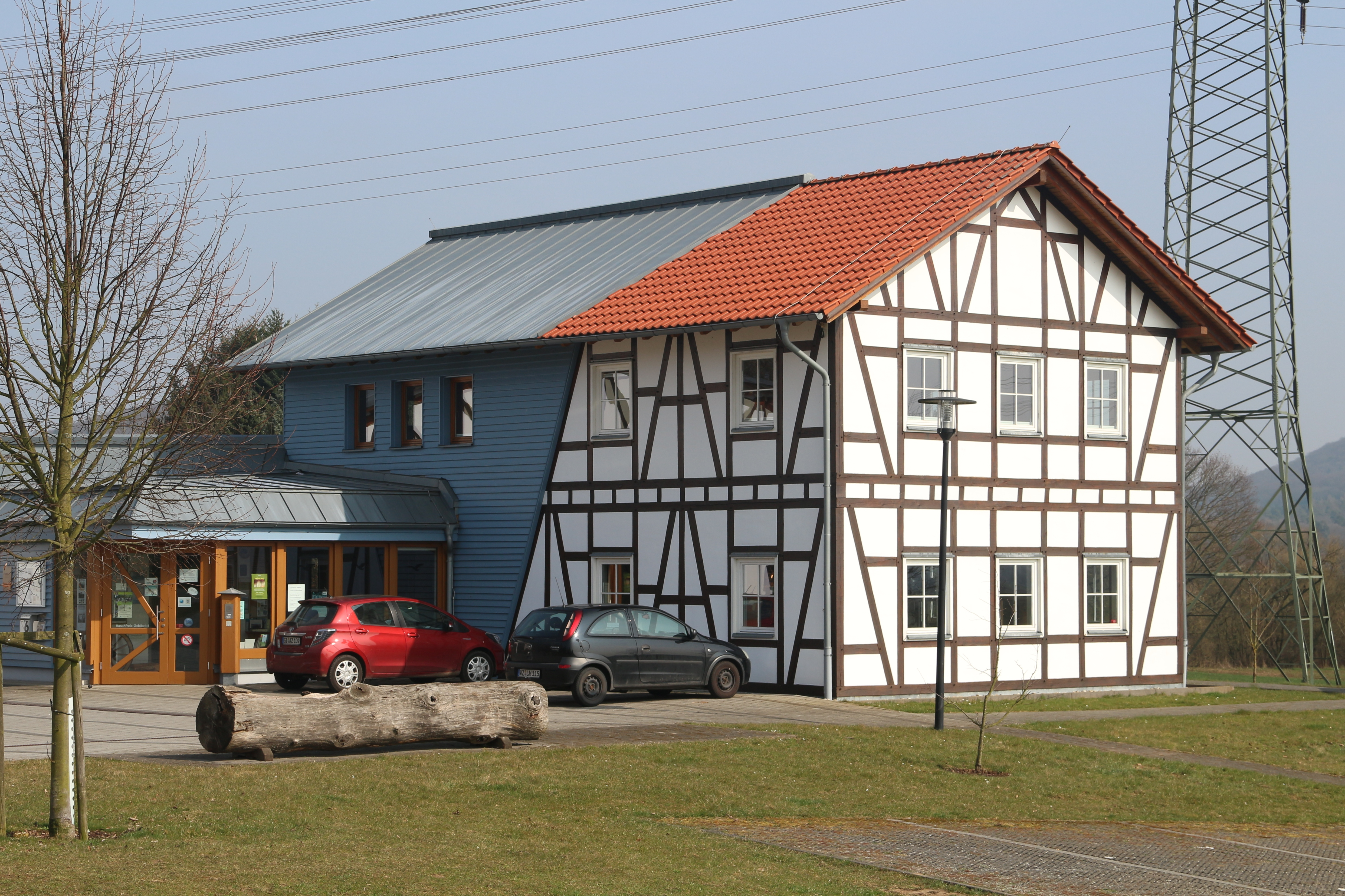 Wißmar